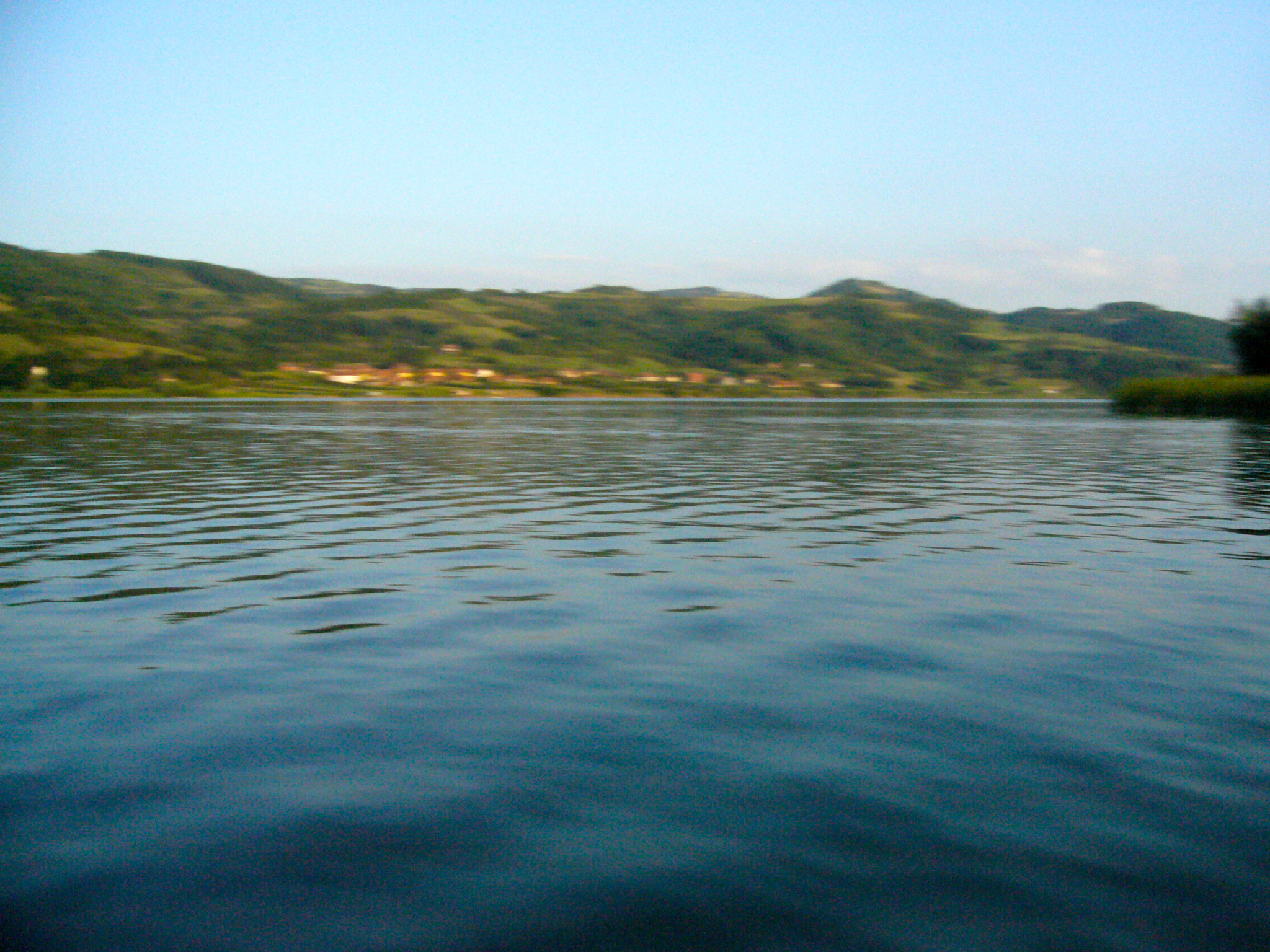 Ćelije